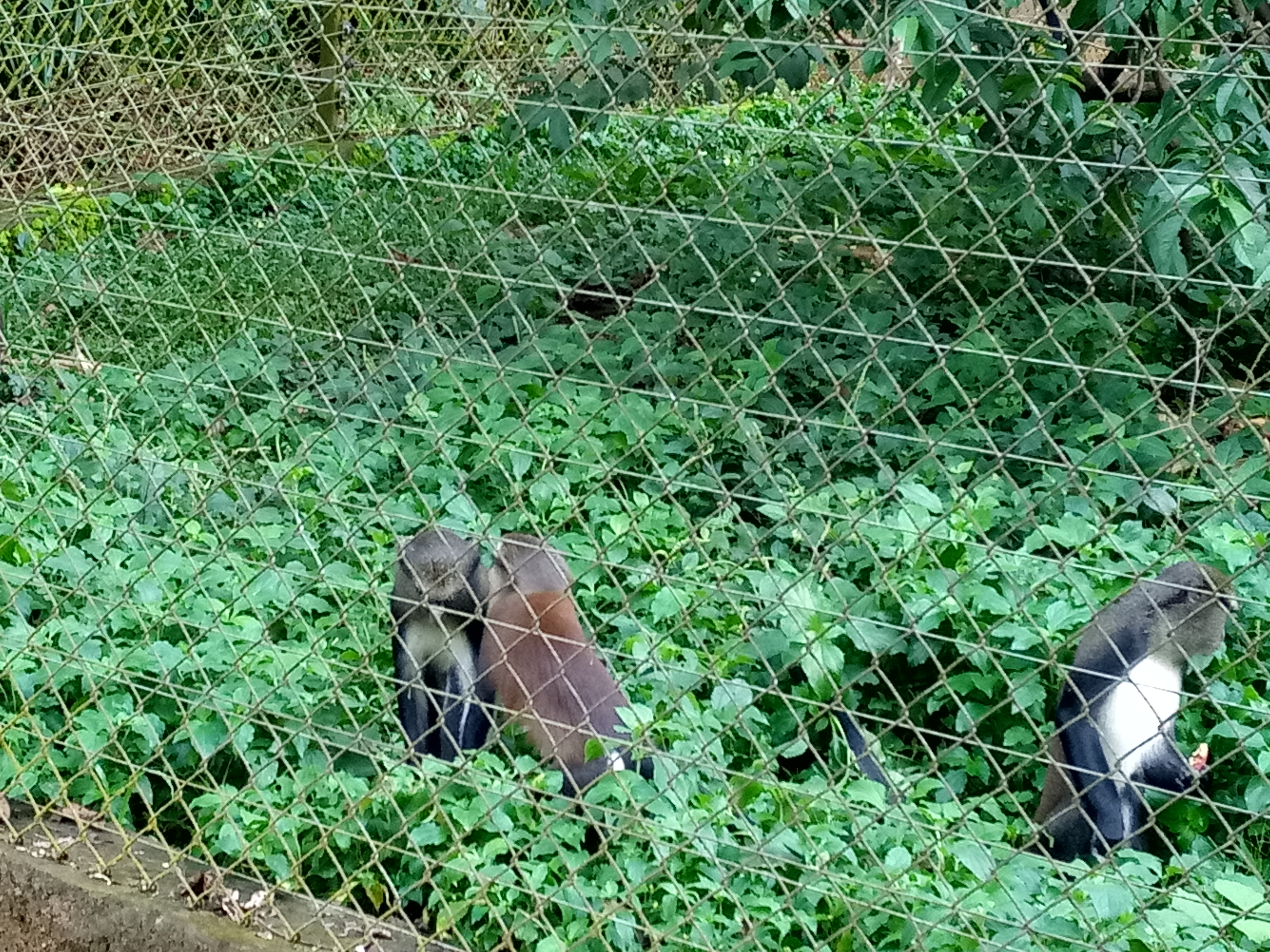 Primate Reserve sanctuary Mefou, located 5km from Mbalmayo, near Yaoundé